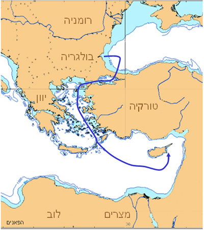 מסלול ההפלגה של אוניית המעפילים עצמאות